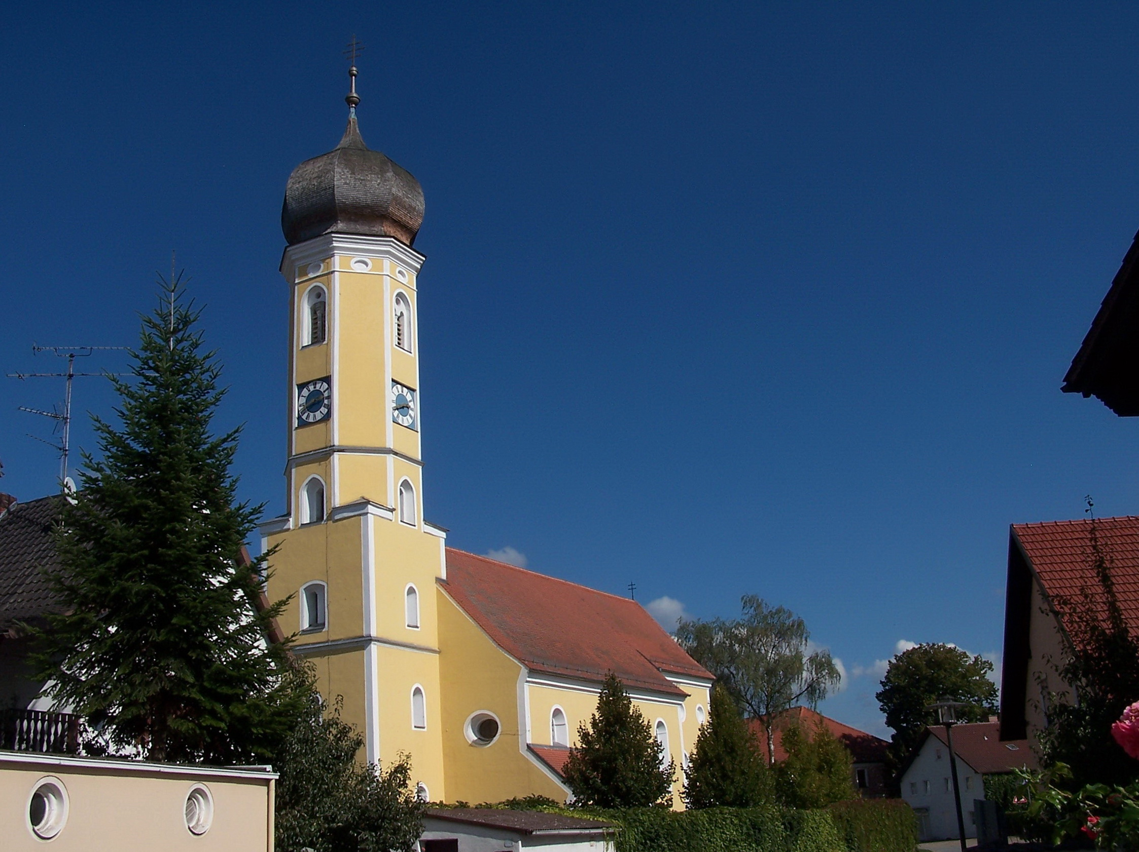 Pfatter, Haidauer Straße 25, Katholische Pfarrkirche Mariä Himmelfahrt, Saalbau mit eingezogenem Chor, abgewalmtem Satteldach, Westturm mit Zwiebelhaube, 15. Jahrhundert, im 18. Jahrhundert verändert; mit Ausstattung; Friedhofsmauer, 17./18. Jahrhundert